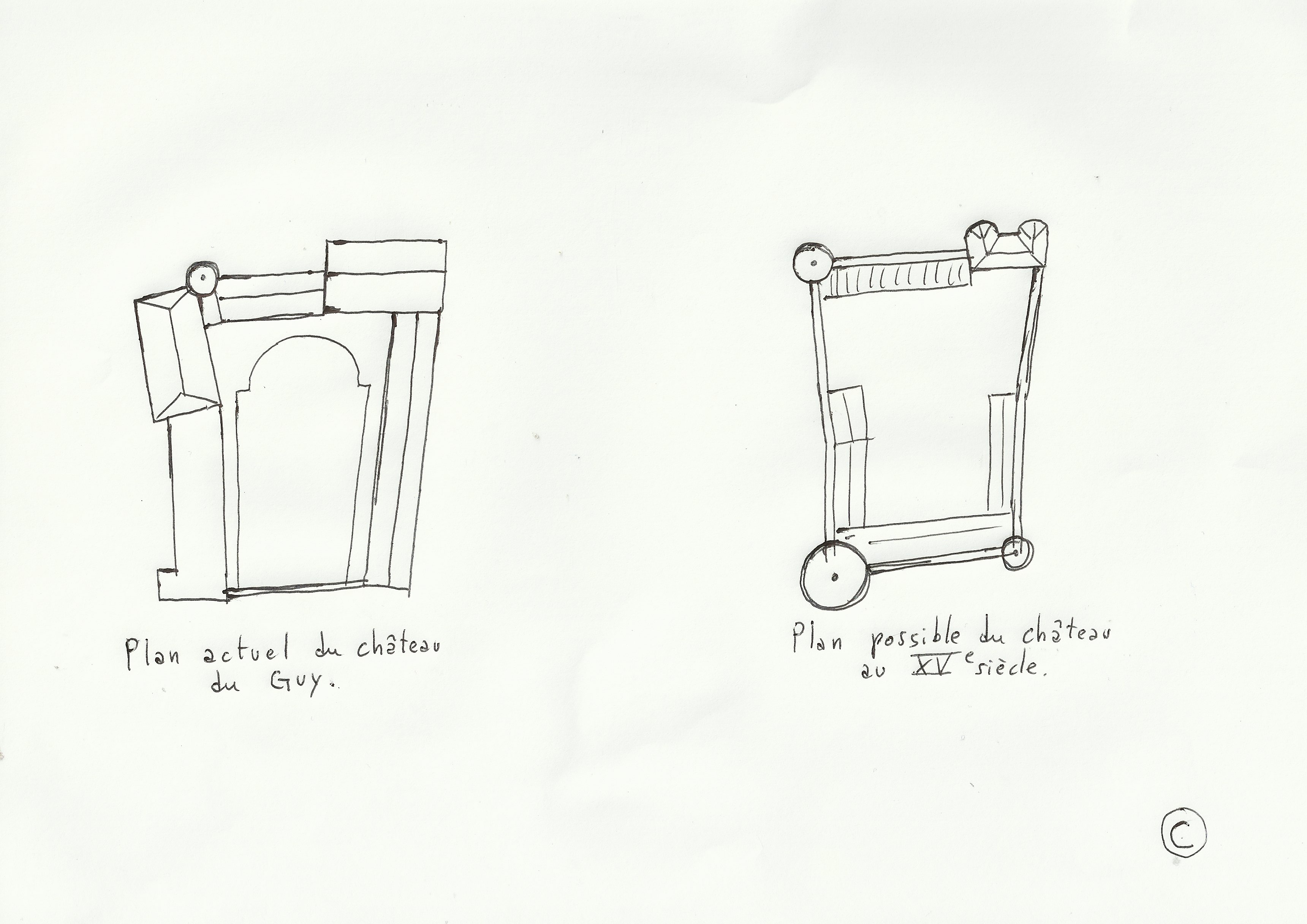 Essai de reconstitution du plan du château du Guy près de Lairoux, à partir du plan actuel de la propriété.